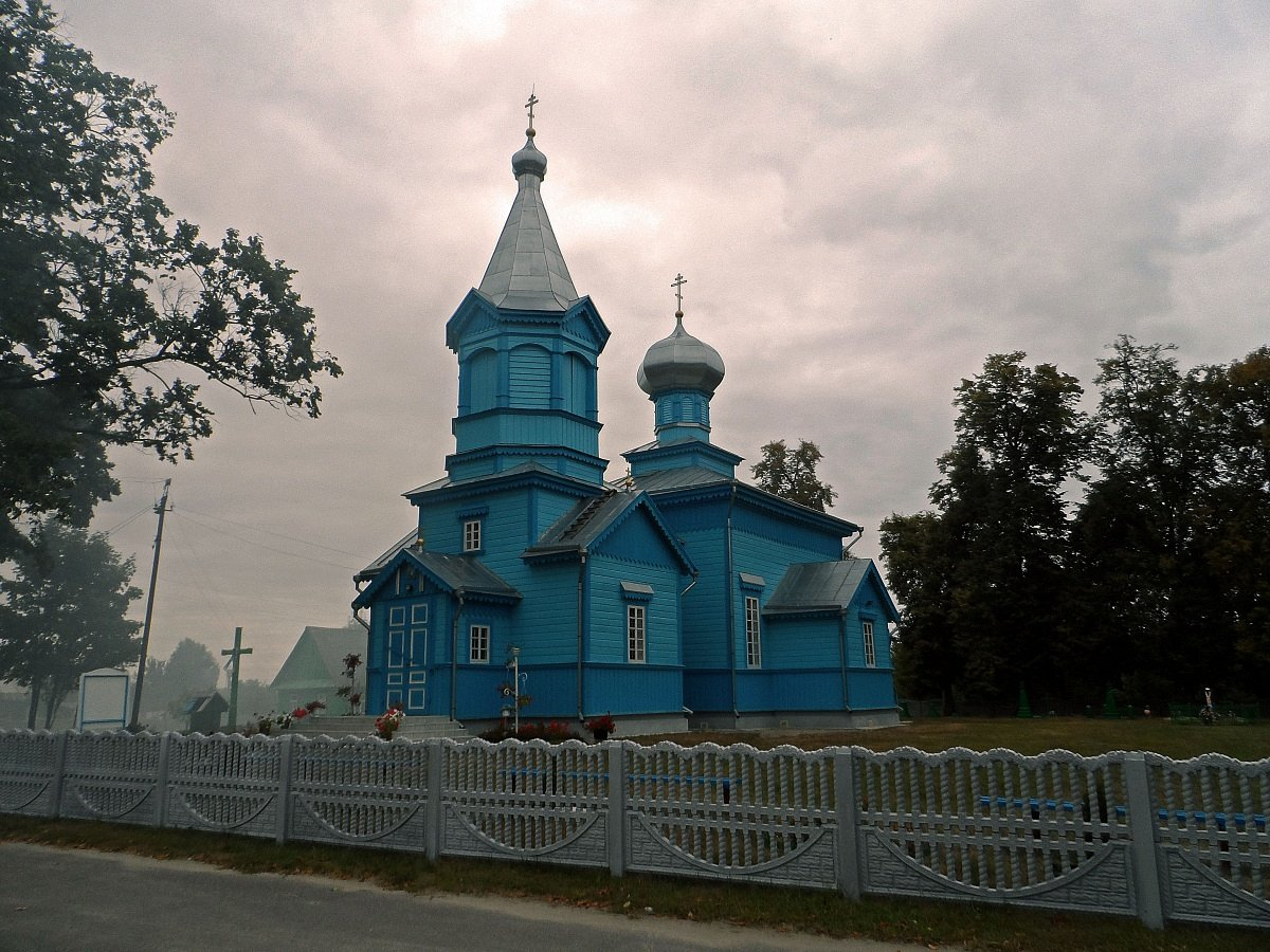 Дзівін. Царква Раства Прасв. Багародзіцы